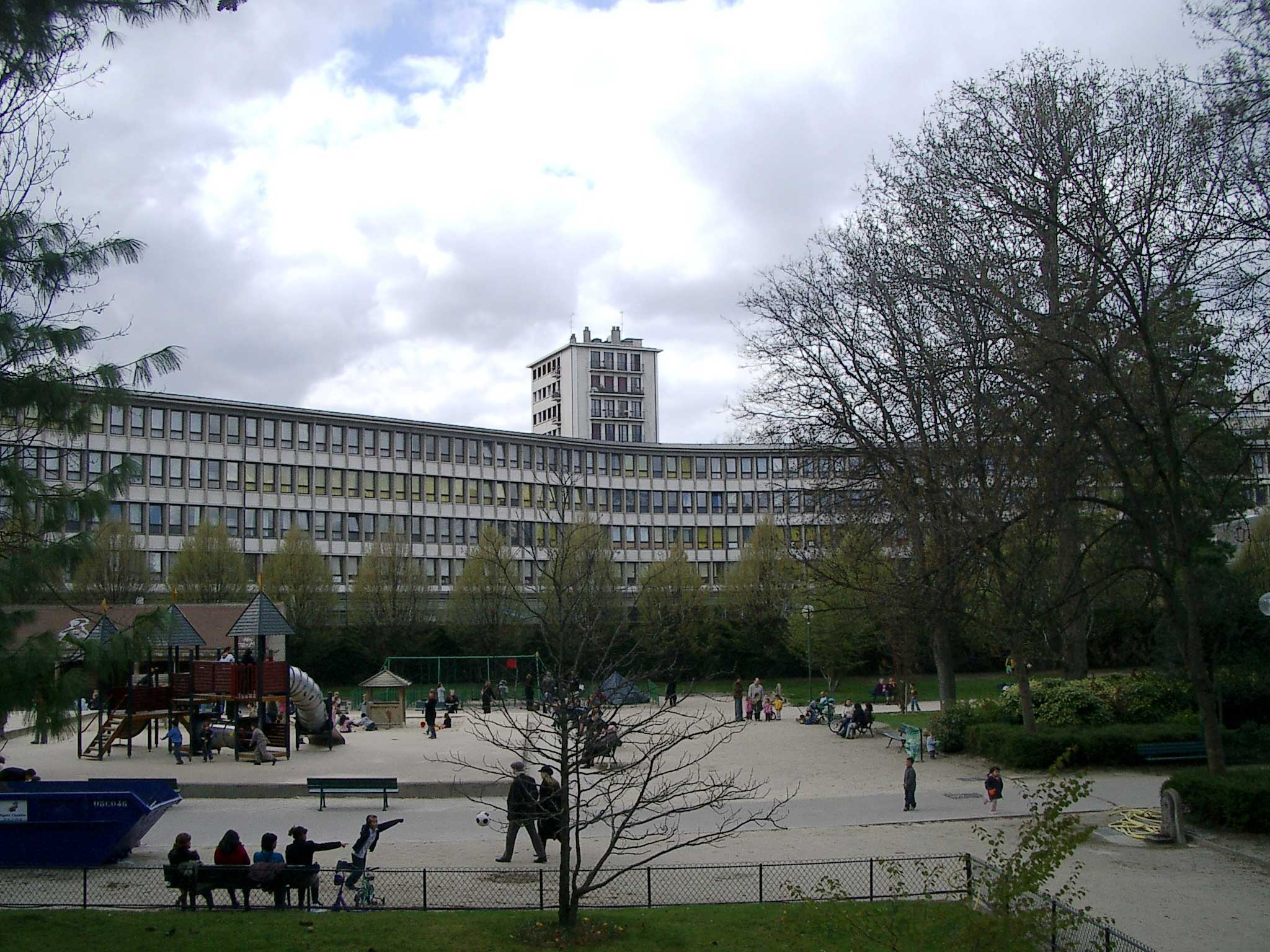 C'est une photo du lycée Rodin à Paris